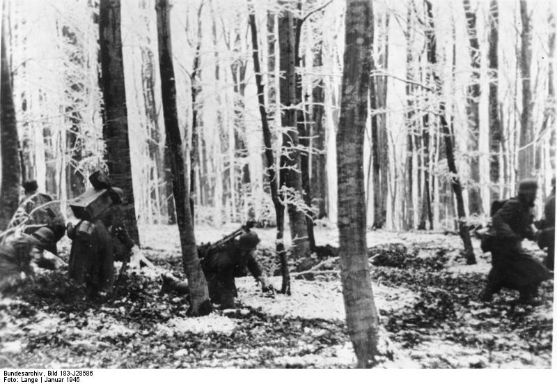 Durchburch in den Ardennen Mit "Hurra!" brechen deutsche Grenadiere gegen einen feindlichen Einbruchskeil, der sie vorübergehend von ihrer Nachbareinheit trennte, vor. Im Laufen feuern sie ihre Maschinenpistolen und LMGs ab. Der Feind weicht vor dieser Zusammenballung von Kraft und letztem Einsatz zurück, und nach kurzer Zeit gelingt nach geringen Verlusten dem Regiment der Durchburch. Die Verbindung zu den Nachbareinheiten ist wieder hergestellt. PK-Aufnahme: Kriegsberichter Lange 15.1.1945 [Herausgabedatum] TEXT - Zentralbild II. Weltkrieg 1939-45 Rückzugskämpfe der deutschen faschistischen Wehrmacht in den Wäldern der Ardennen im Januar 1945